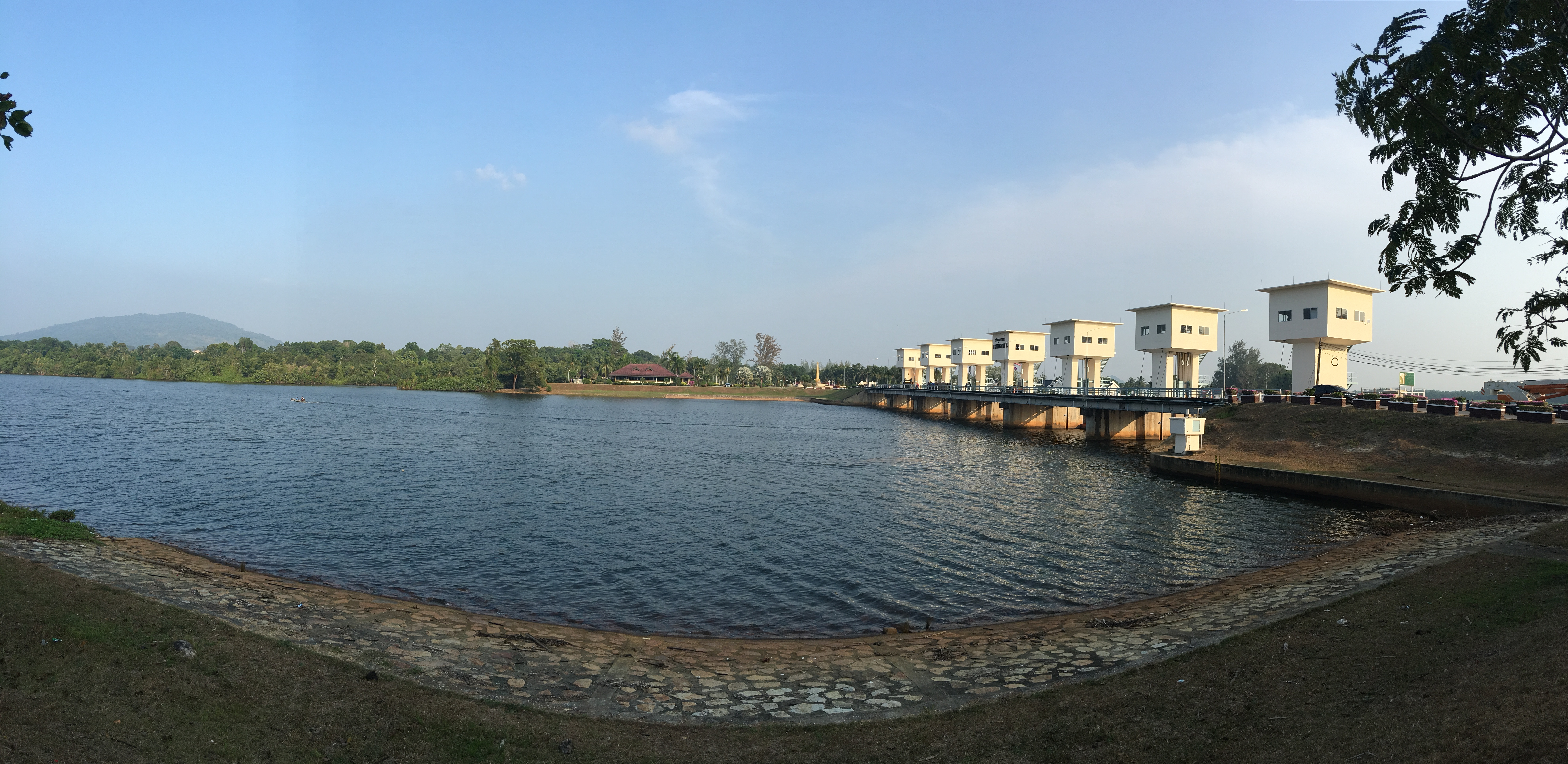 Bang Nak, Mueang Narathiwat District, Narathiwat 96000, Thailand